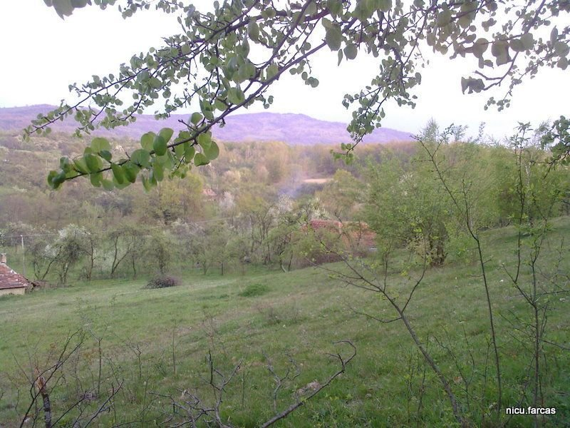 Măgura Priei aparţine Munţilor Meseşului fiind şi cel mai inalt vârf al acestora (996m.). Culmile molcom înclinate, izvoarele reci şi pâraiele cu apă cristalină, fac parte din pitorescul locului